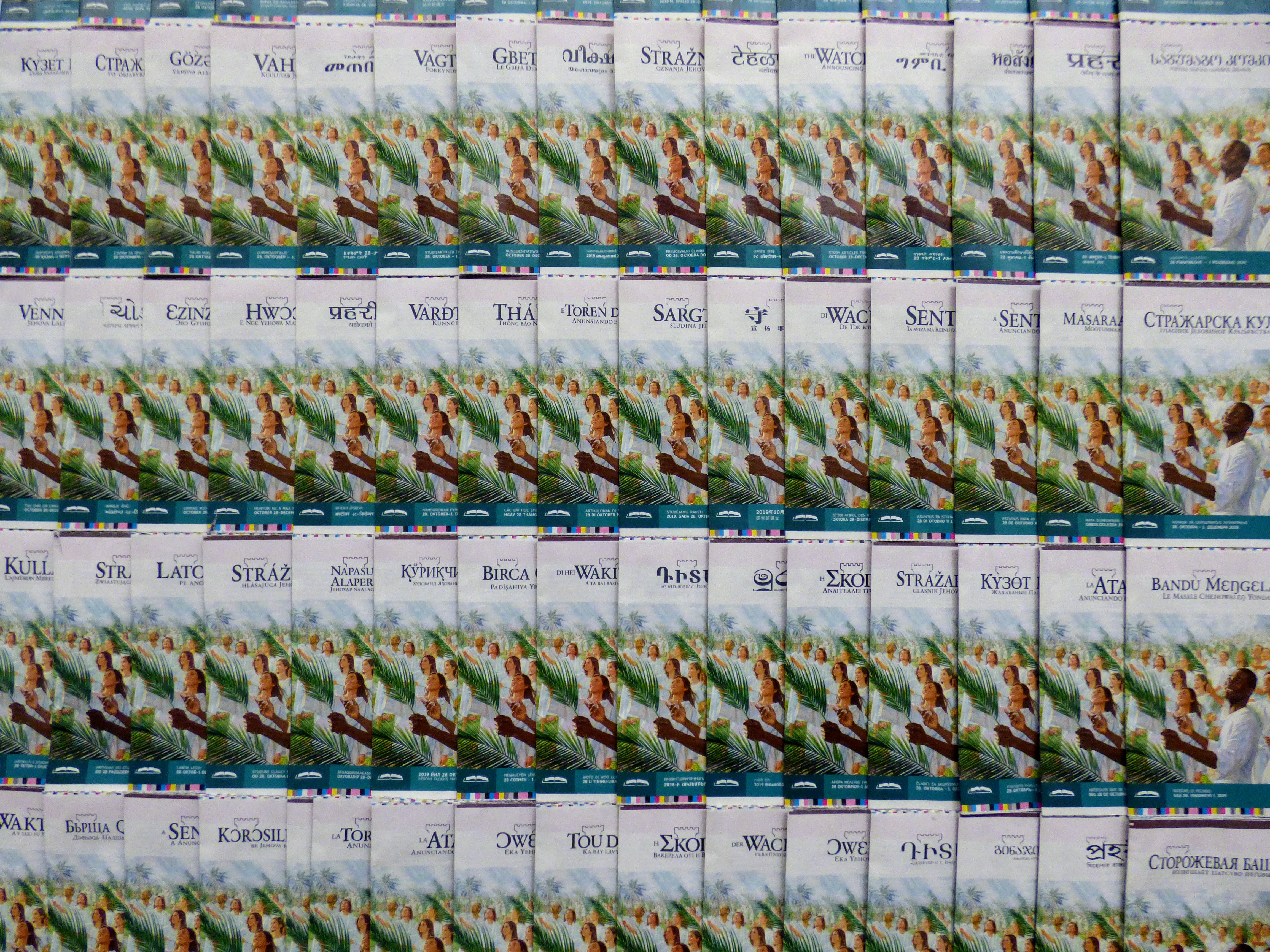 Zeitschrift "Der Wachtturm", Auswahl von in Selters (Deutschland) gedruckten Sprachen